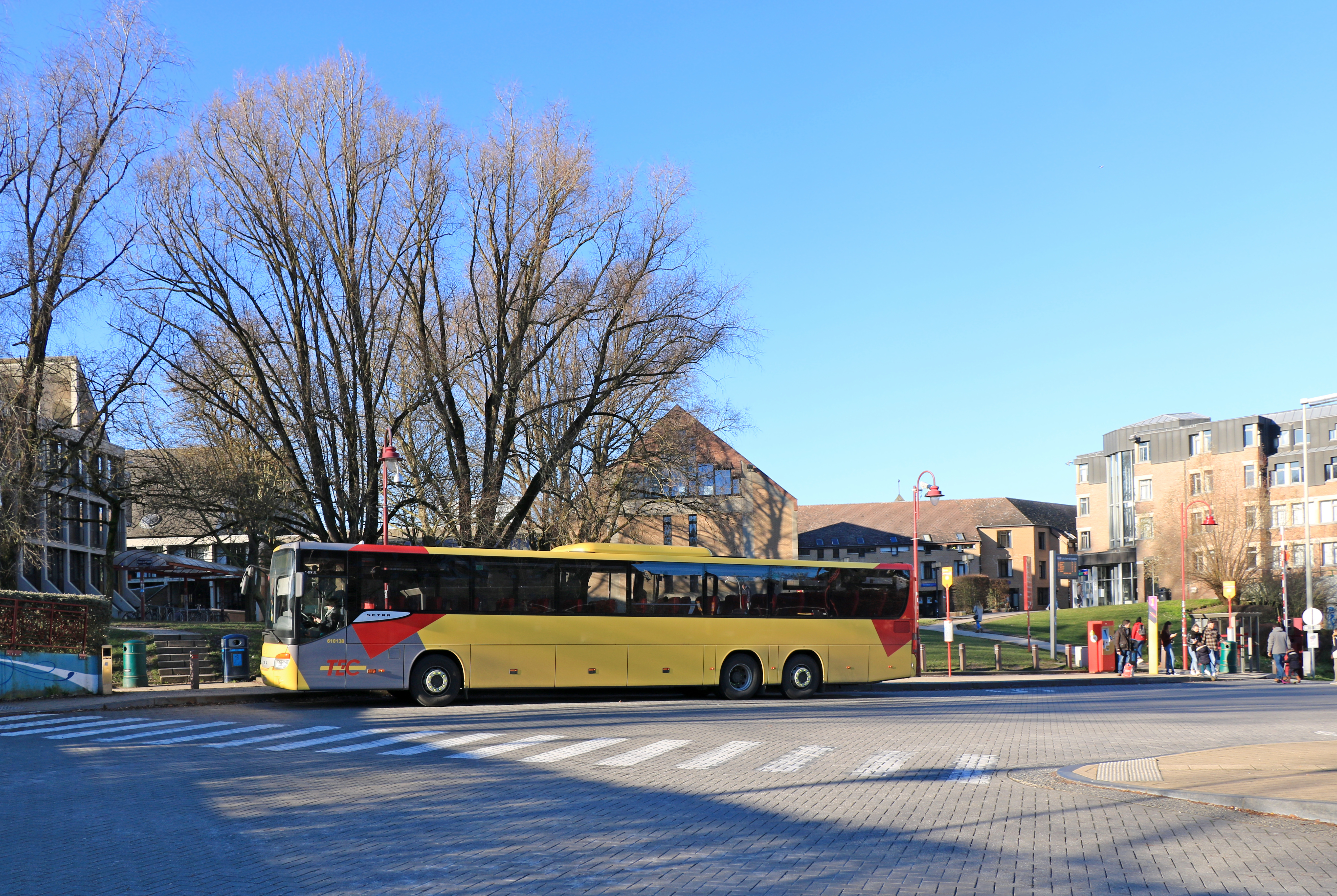 Belgique - Brabant wallon - Louvain-la-Neuve - Gare des bus